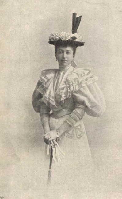 Gróf Apponyi Albertné von Mensdorff-Pouilly Klotild grófnő (1867–1942)